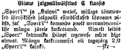 Ajaleheväljalõige, "Eilane jalgpalliwõistlus C klassis"